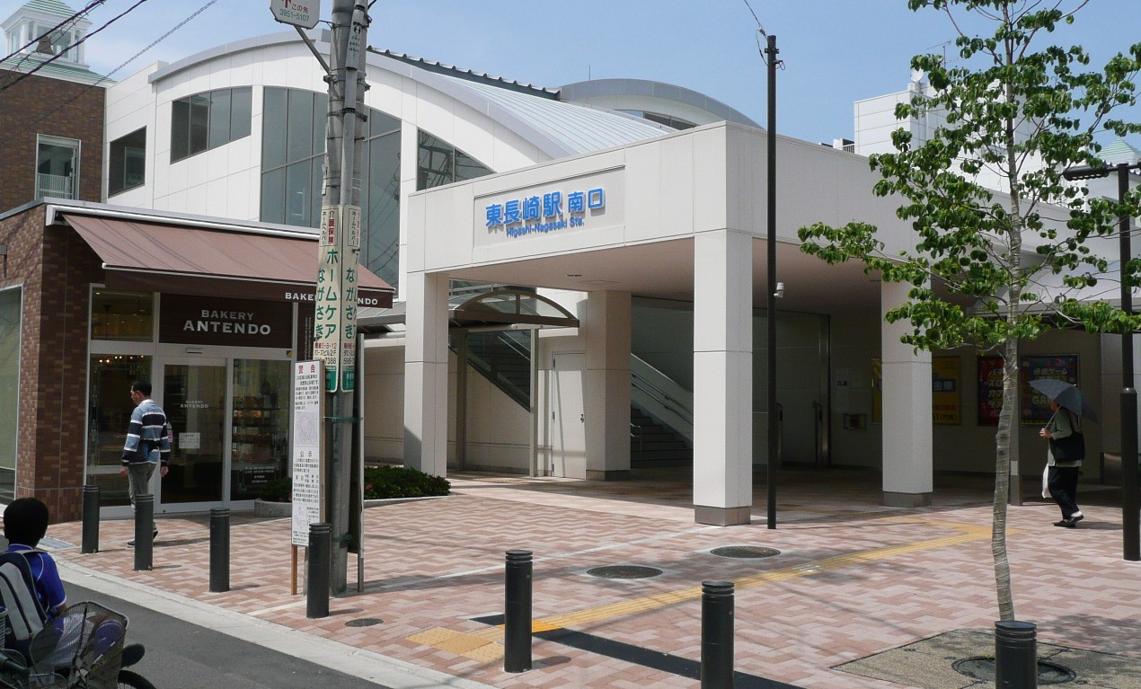 東長崎駅南口